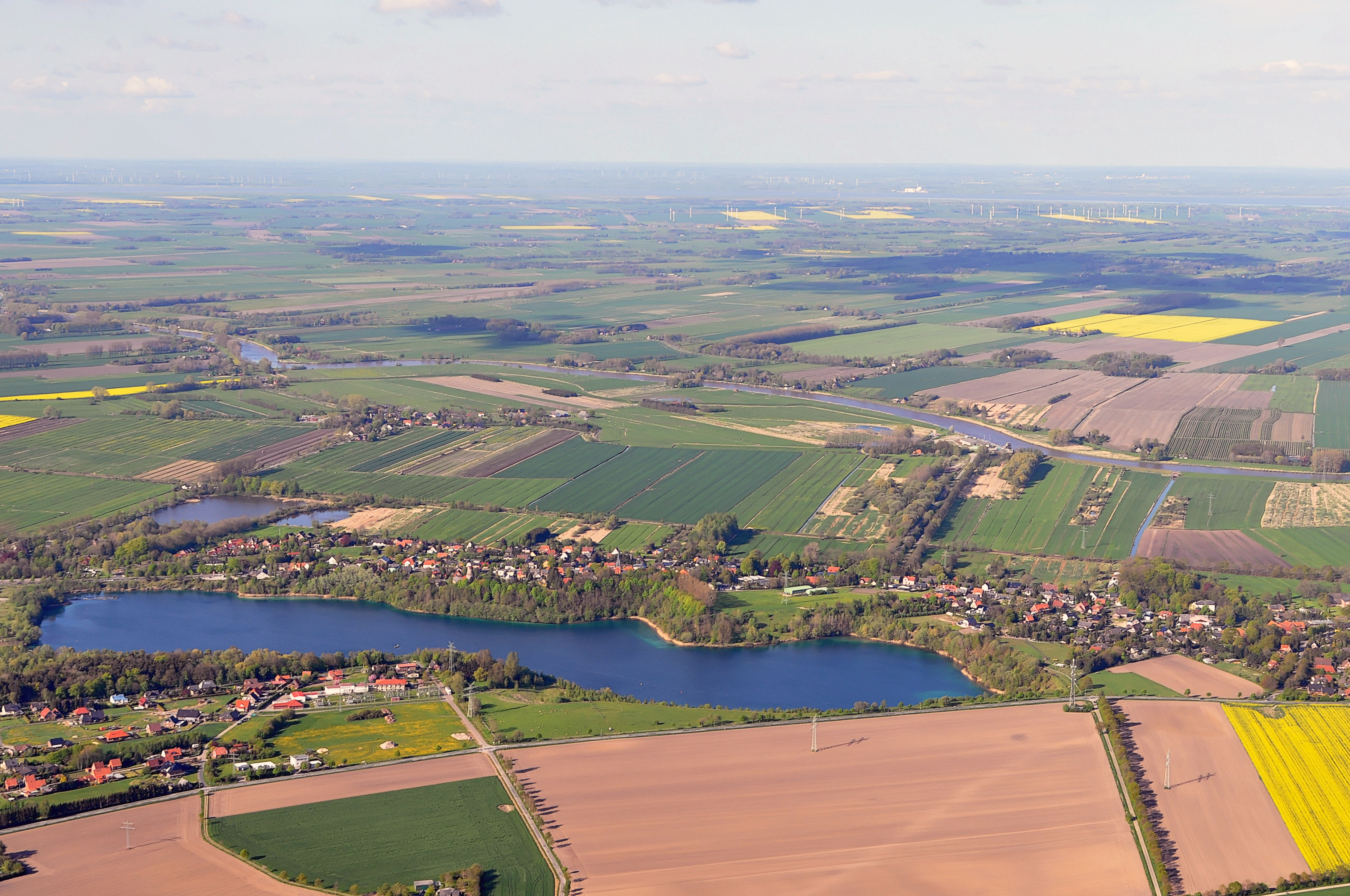 Luftbilder von der Nordseeküste 2012-05